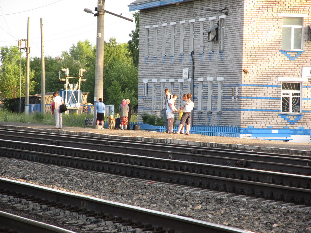 Ожидание поезда ст. Емца Архангельская обл. Плесецкий р-н